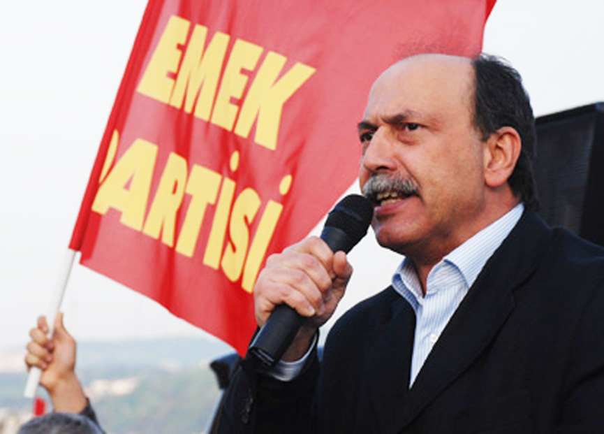 Photo de Levent Tüzel